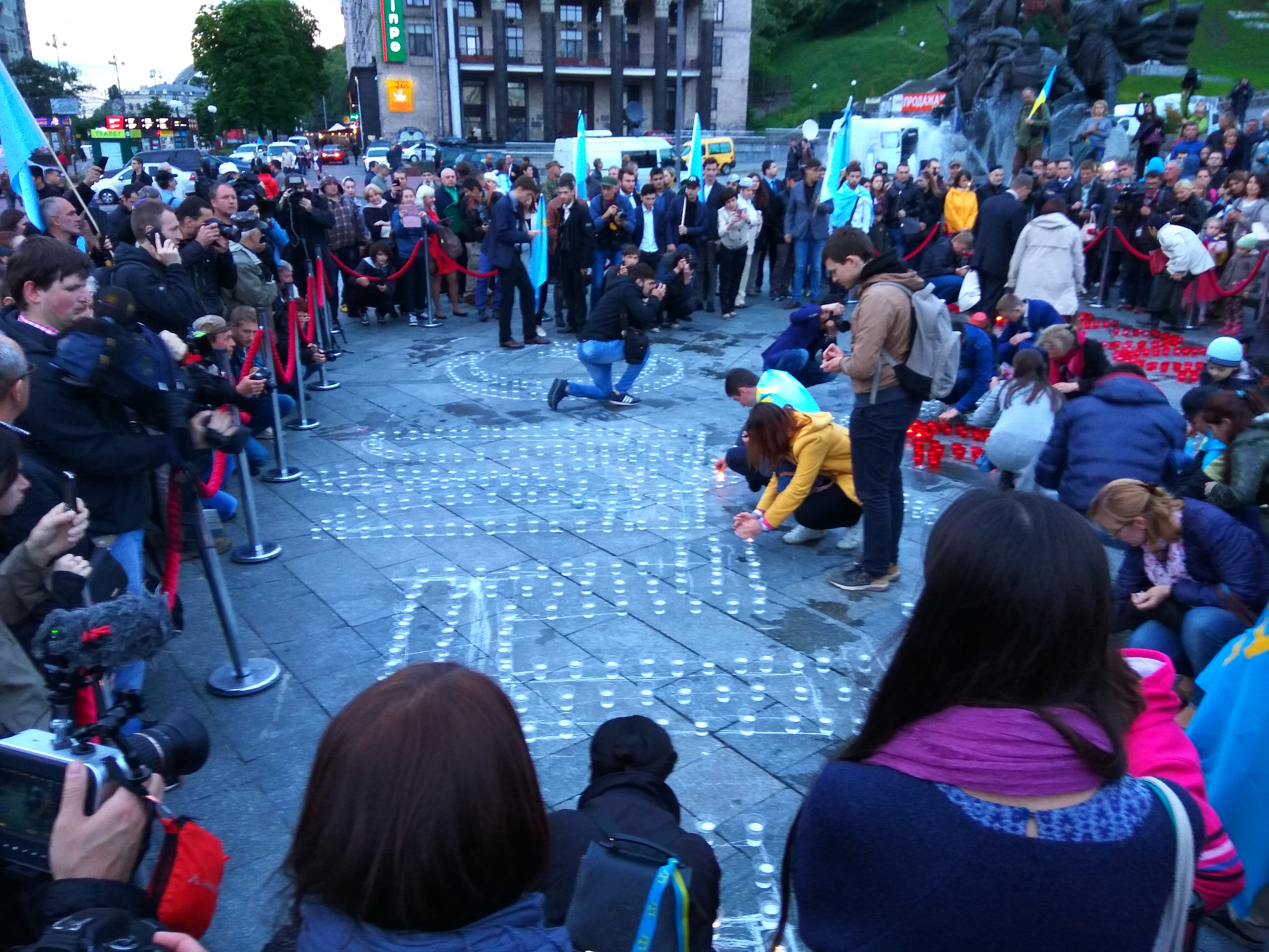 День пам'яті жертв геноциду кримськотатарського народу